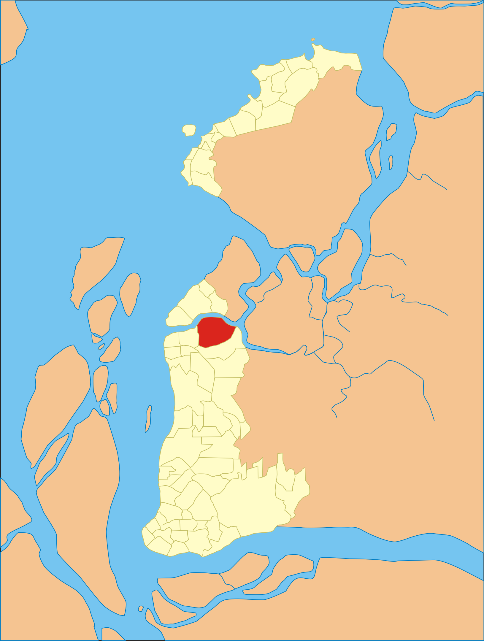 Localização do bairro em Belém do Pará